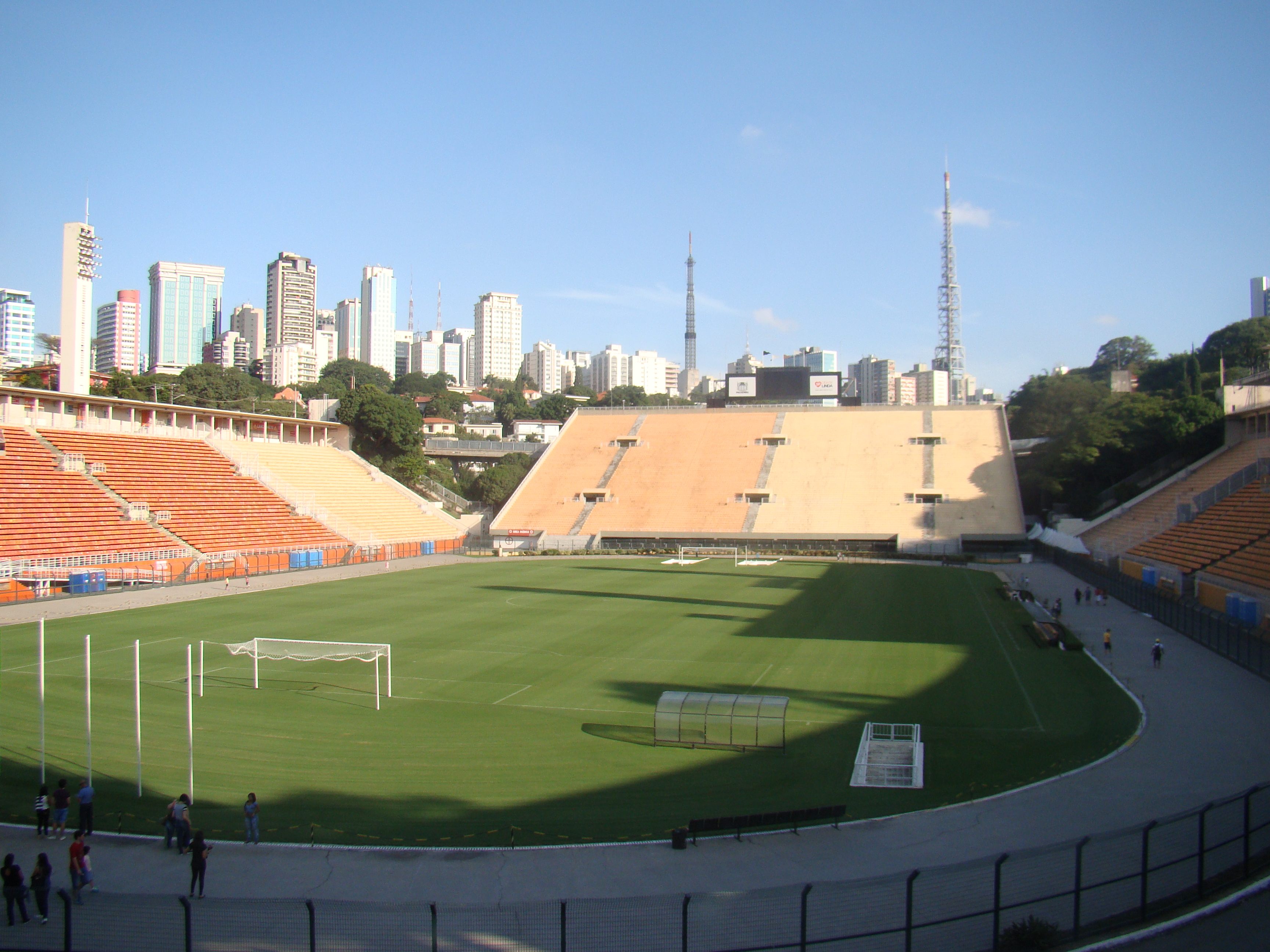 Interior do Estádio do Pacaembu